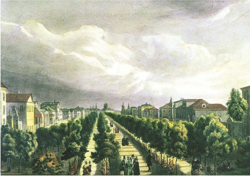 Тверской бульвар, 1825 г., литография, Музей А.И. Герцена, Москва